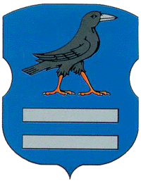 герм смт. Вороніж від 1750 р.